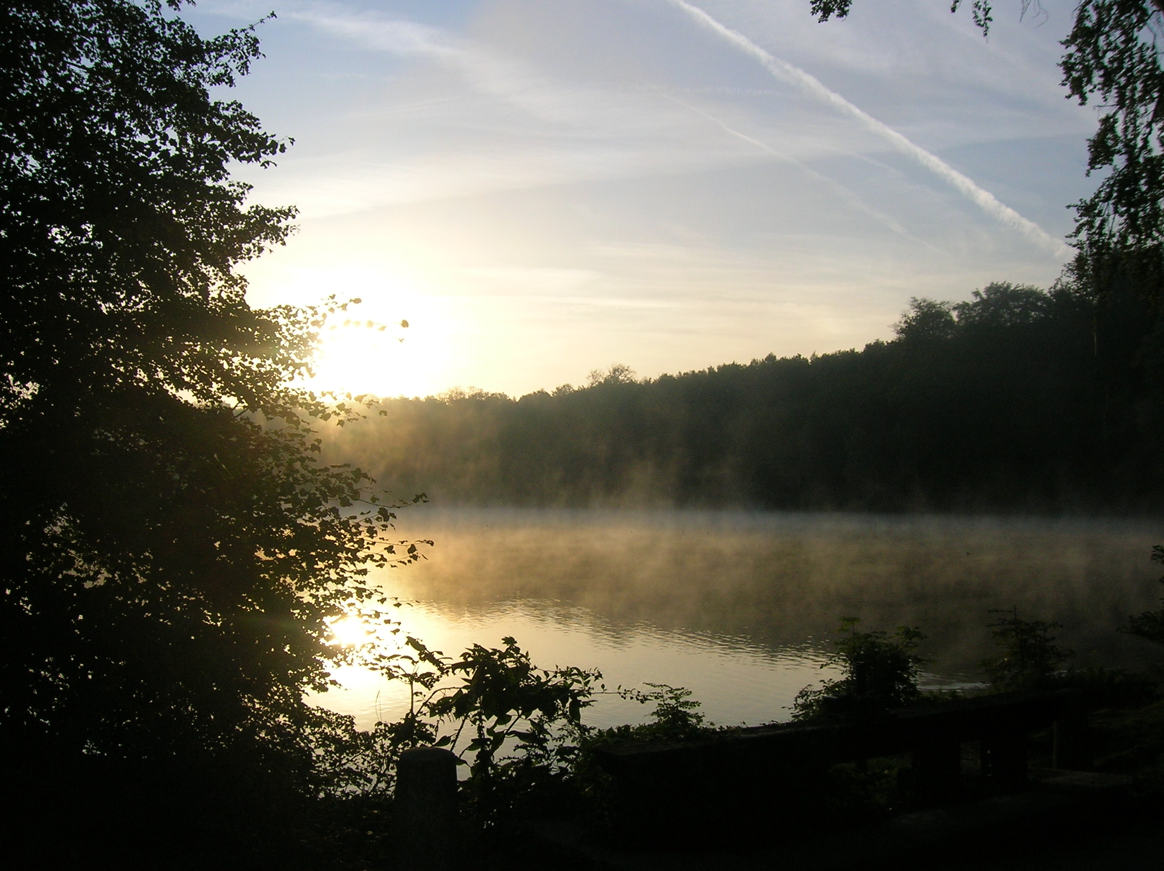 Les étangs de Commelles au lever du jour